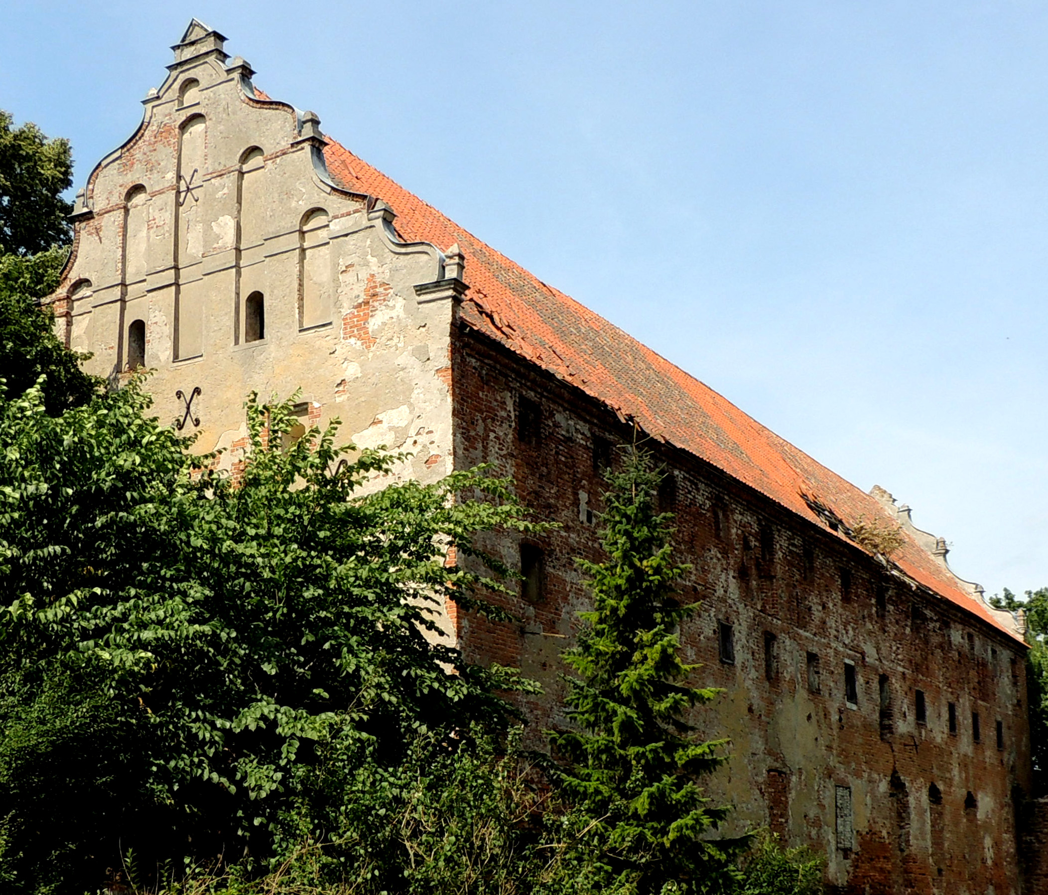 Pieniężno, zamek kapituły warmińskiej, XIV, XIX